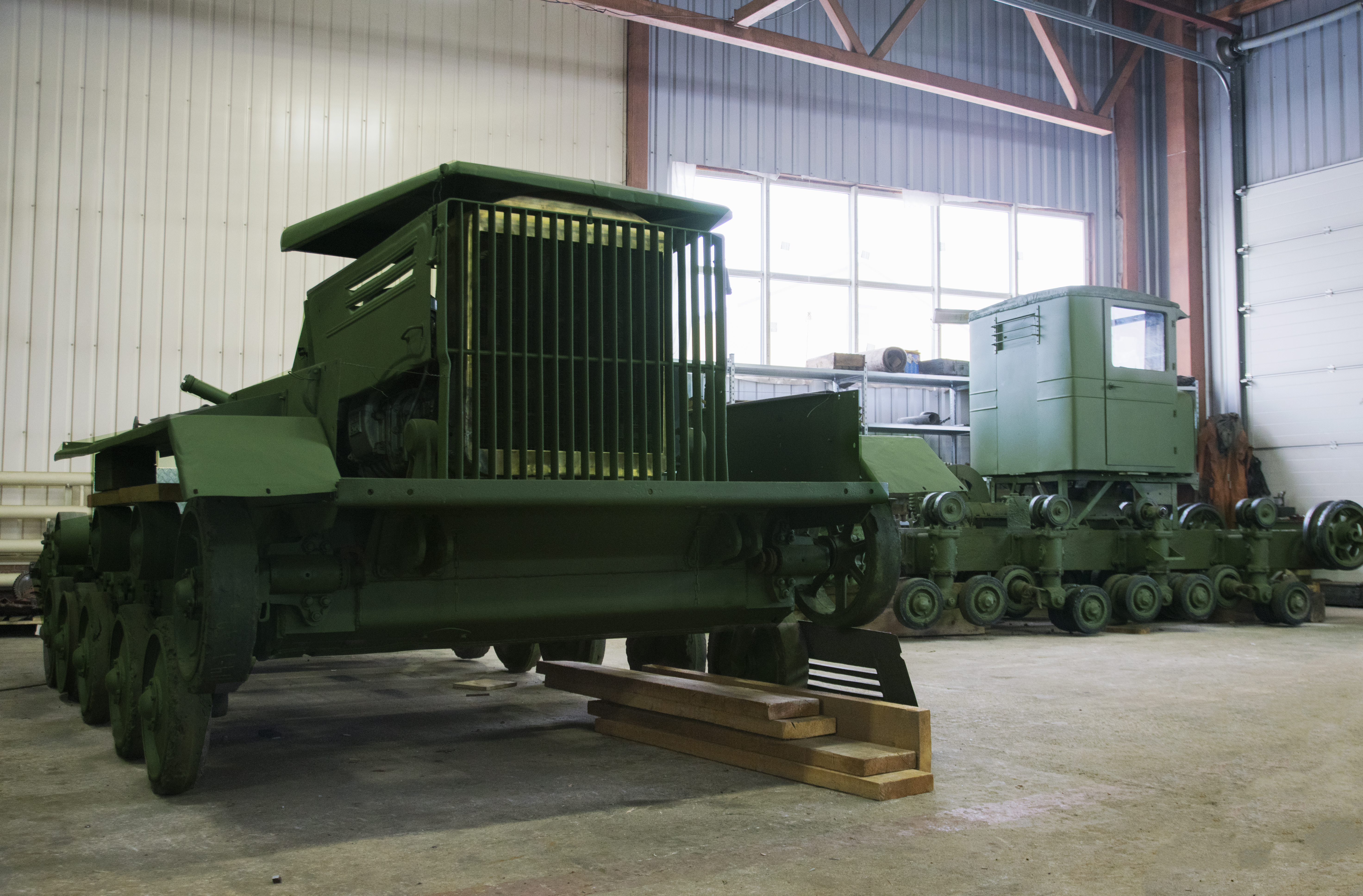 До наших дней сохранился только один тягач «Коминтерн»